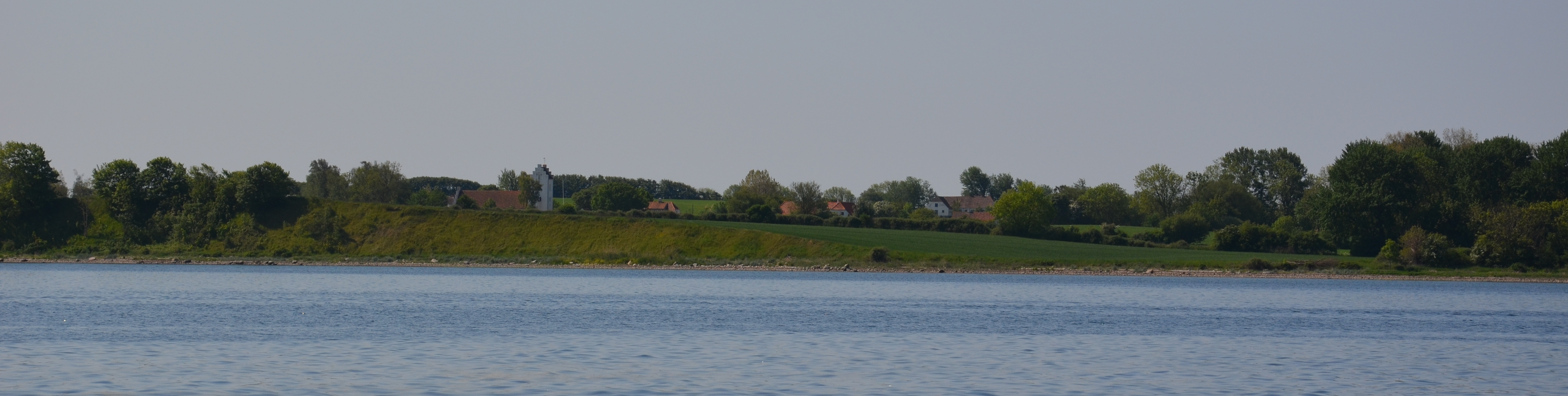 Ansicht von Avernakø By mit Avernakø Kirke